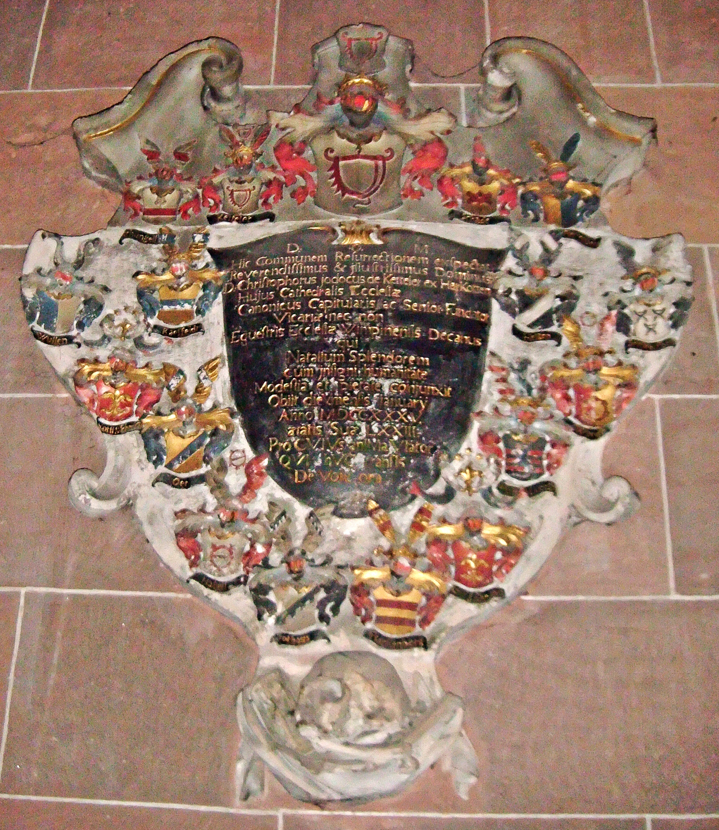 Epitaph des Wormser Domherren und Wimpfener Stiftsdekans Christoph Jodokus von Ketteler-Harkotten (+ 1735), Dom zu Worms, südliches Querschiff